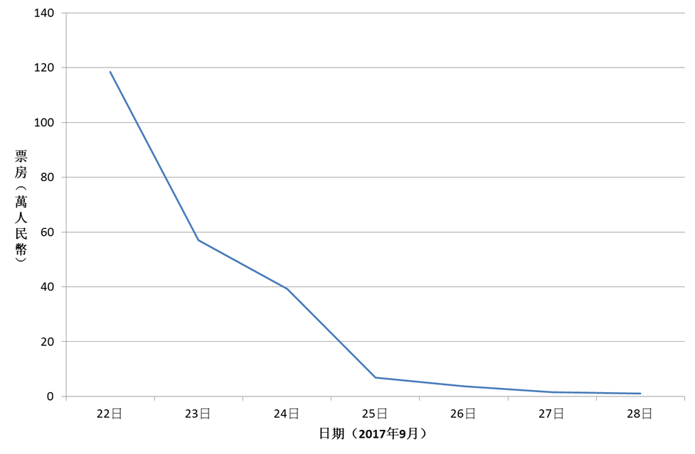 《纯洁心灵·逐梦演艺圈》第一次上映期间的票房